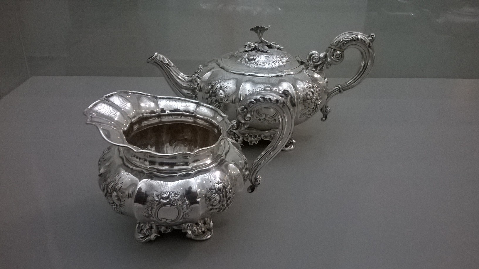 Zilveren theepot en melkkan gemaakt door Jean George Grebe (1803-1862) in 1845.